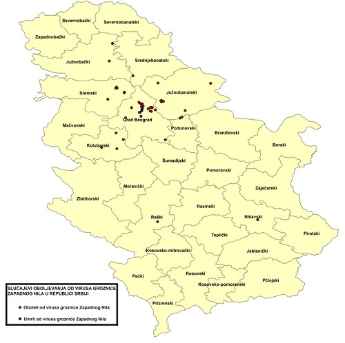 Srpski (latinica): Smrtnost od VZN po regionima Srbije u 2014.